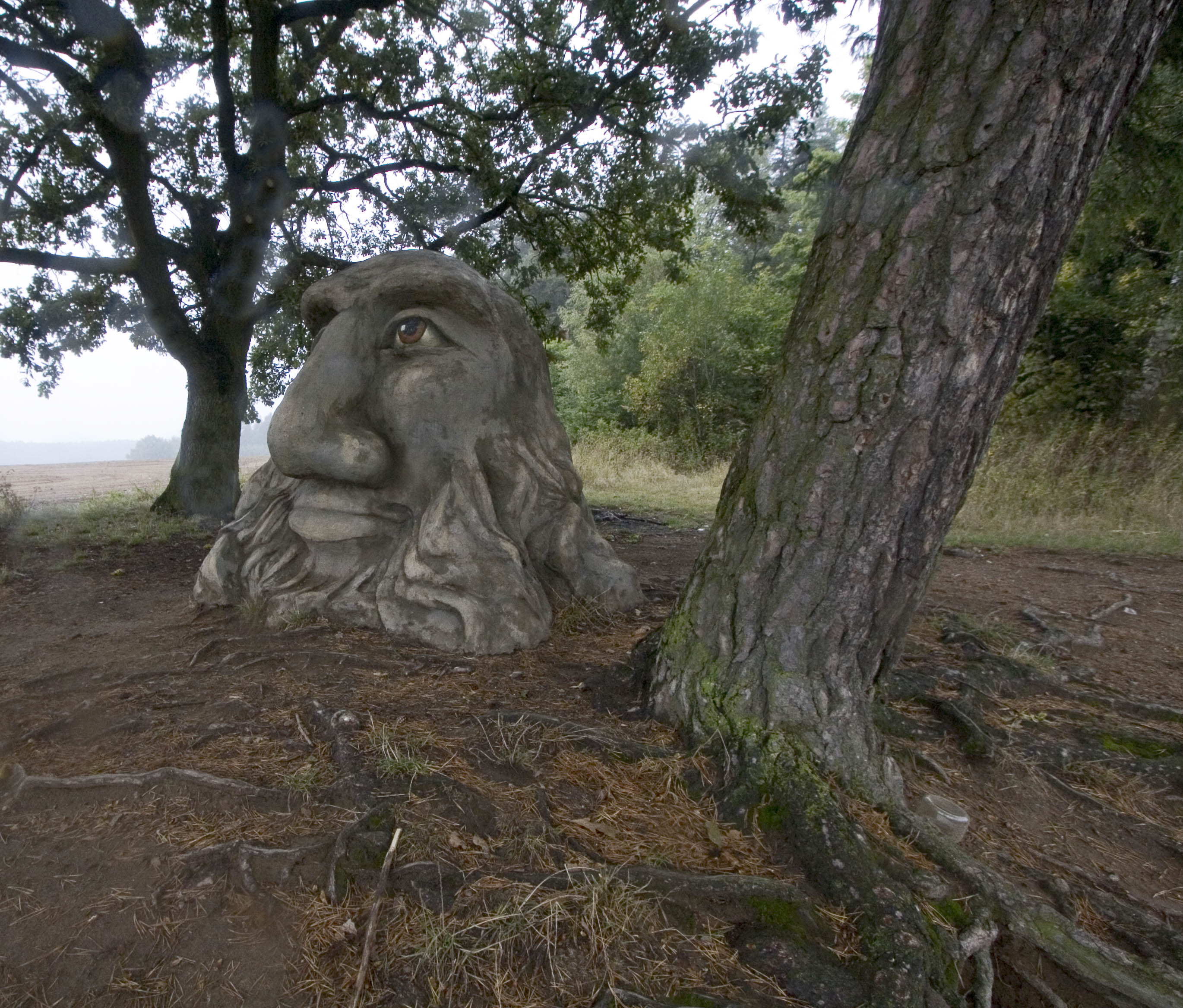 U Mamlase, socha na vyhlídkovém místě u Žďáru nad Sázavou